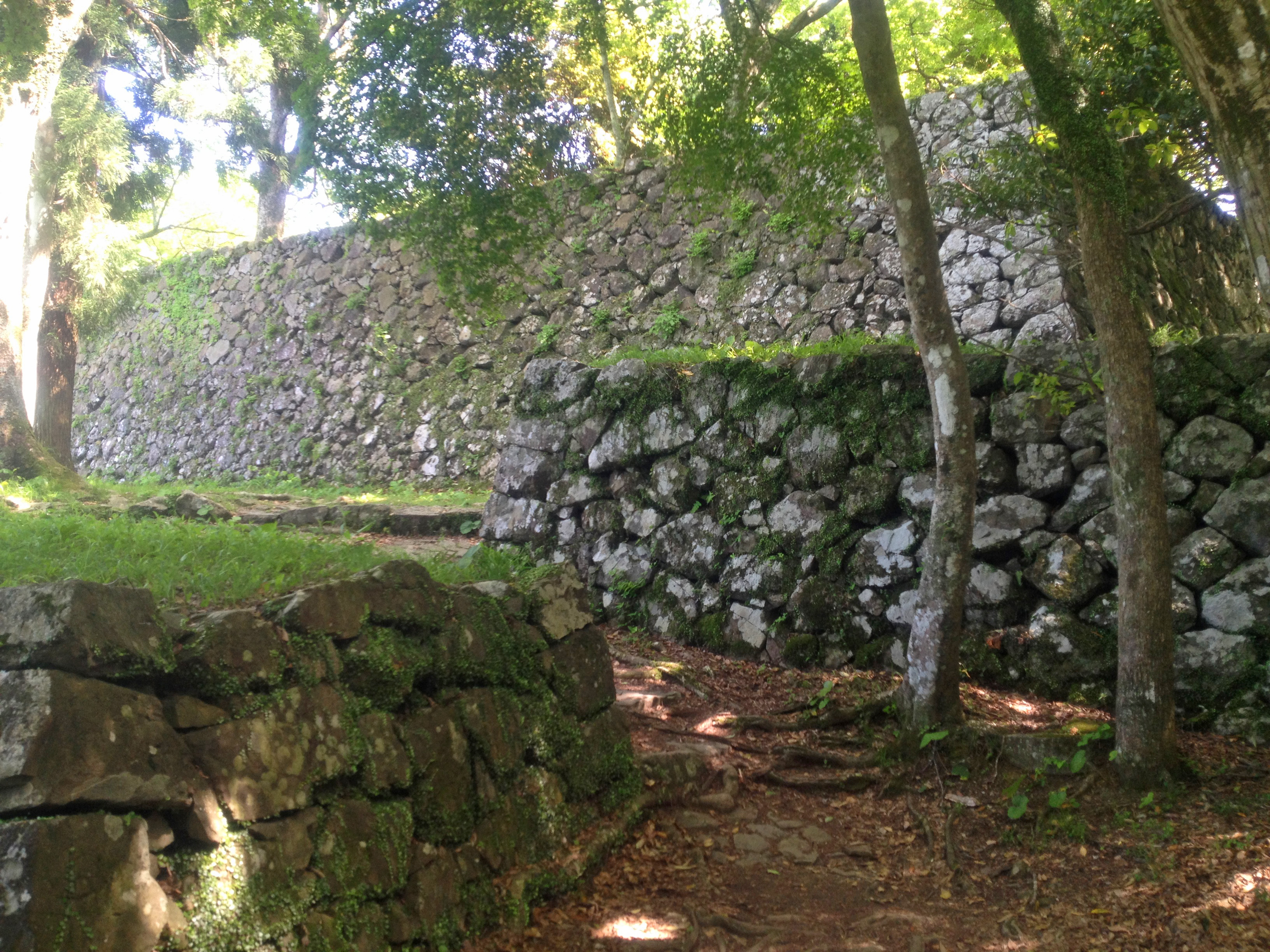 豊後国大分県佐伯市にあった佐伯城の石垣。手前は北出丸虎口石垣、奥は本丸北面石垣